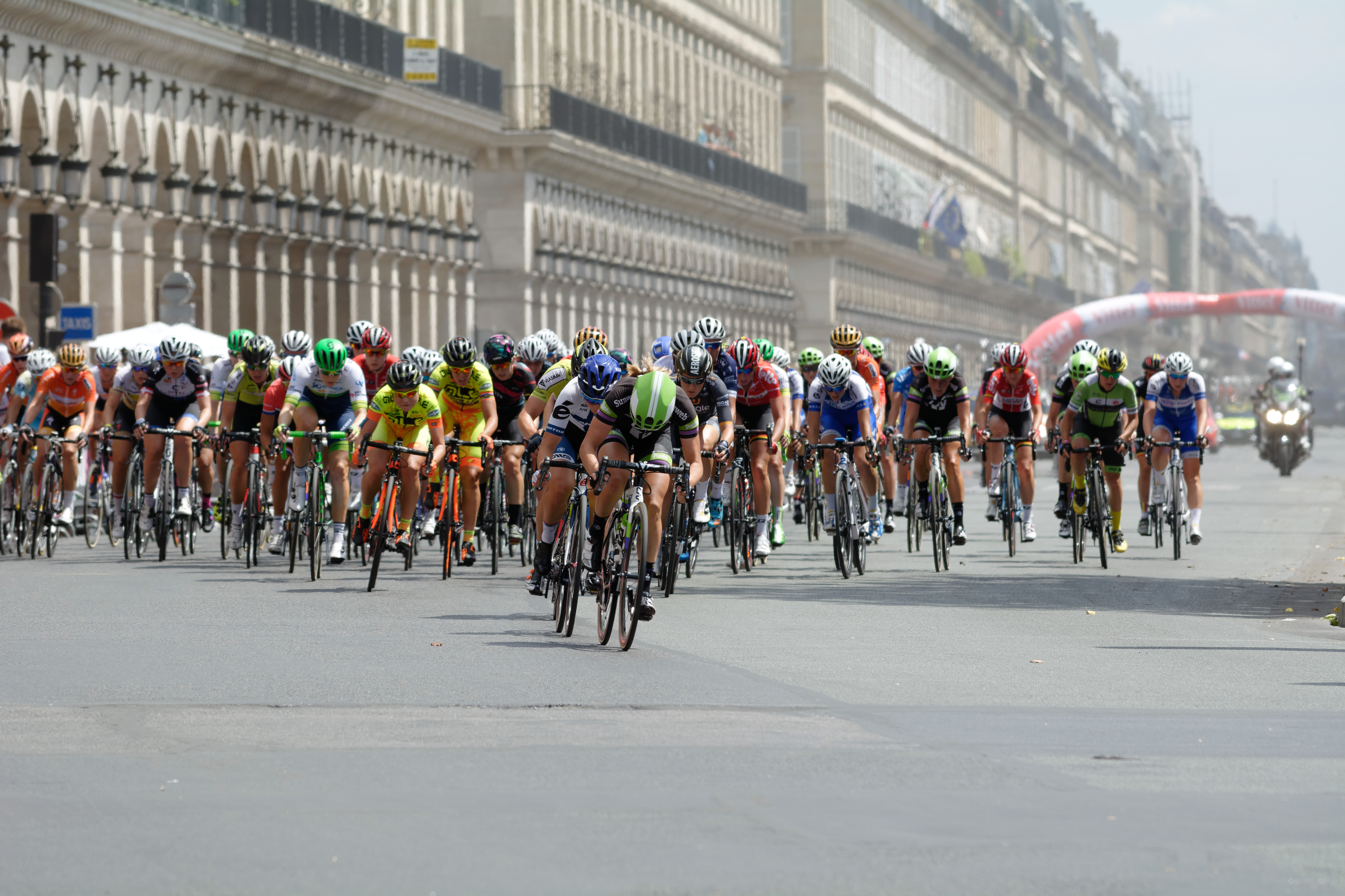 D71_9294_DxO